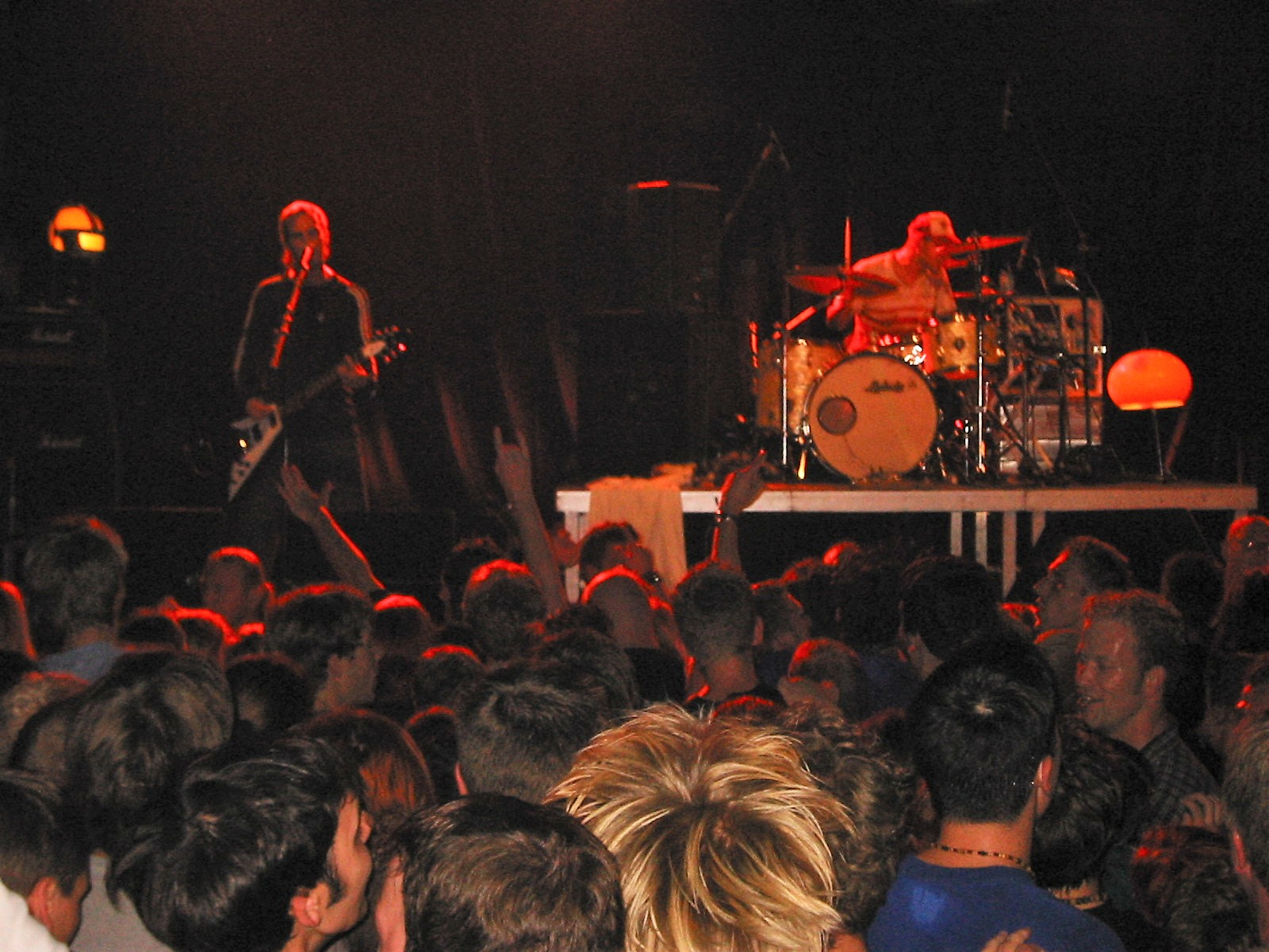 Live-Konzert der deutschen Indie-Rock-Gruppe "Sportfreunde Stiller" in der Aladin Music Hall in Bremen.